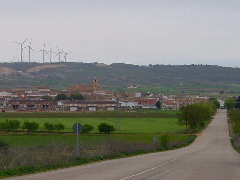 Vista de Sisante